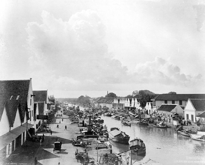 Repronegatief. Gezicht op de Kali Mas vanaf Seinstation, Soerabaia